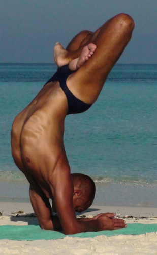 Сидерский Андрей Владимирович, ноябрь 2009